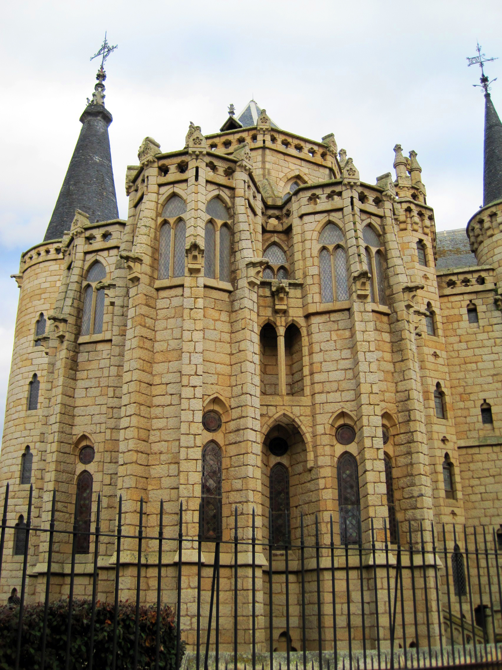 Ábside del Palacio Episcopal de Astorga (León, España).